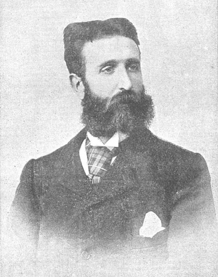 Julio Urbina, marqués de Cabriñana, de Compañy.